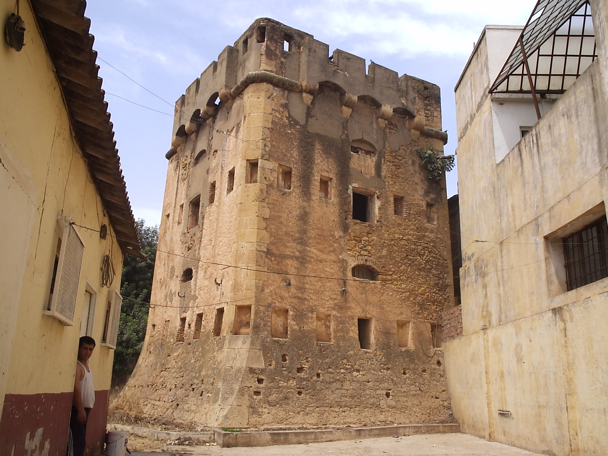 الأتراك بنو 4 لم يبقى منه سوى واحد في تومبورو